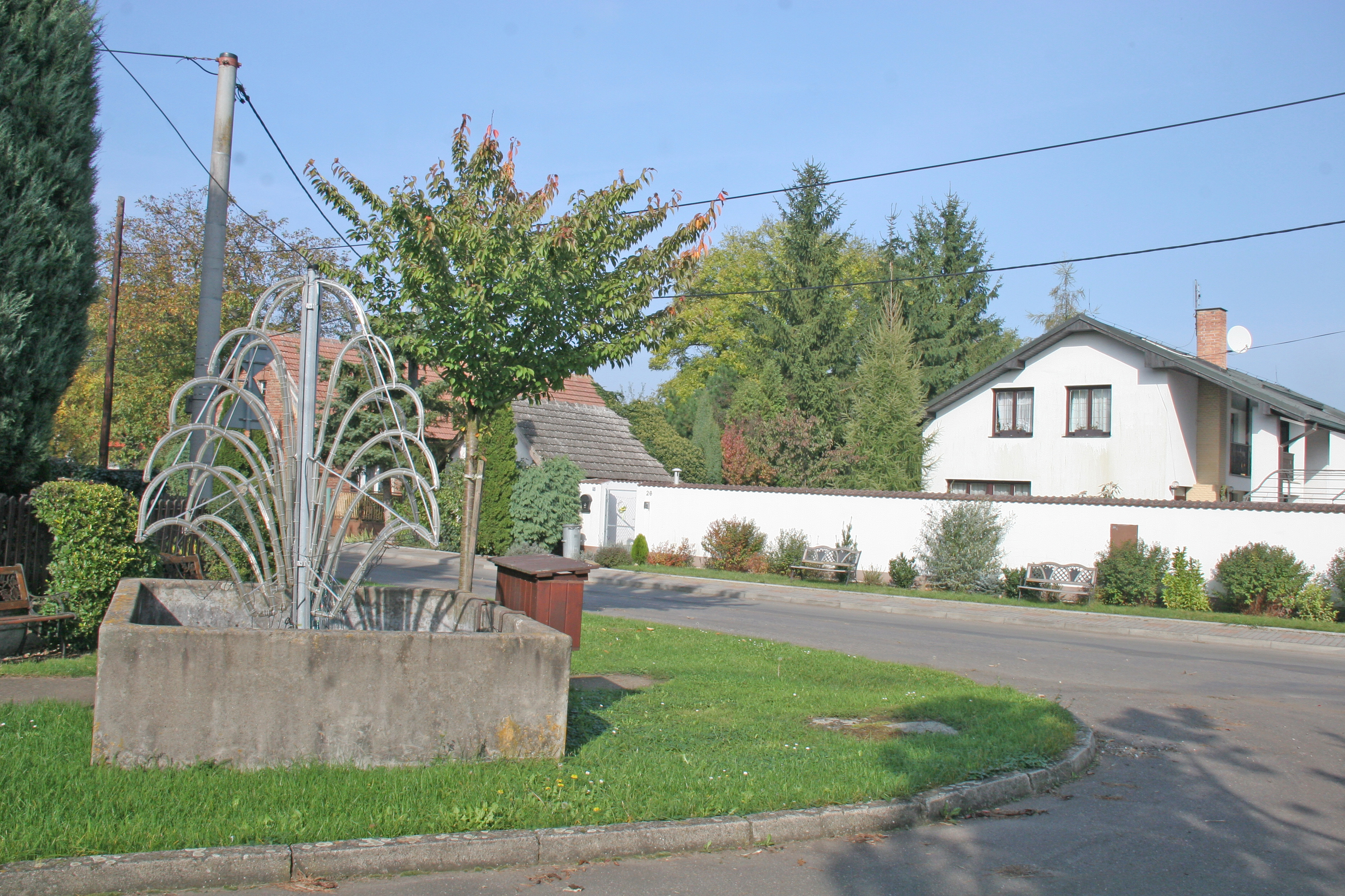 Nová Skřeneř kašna